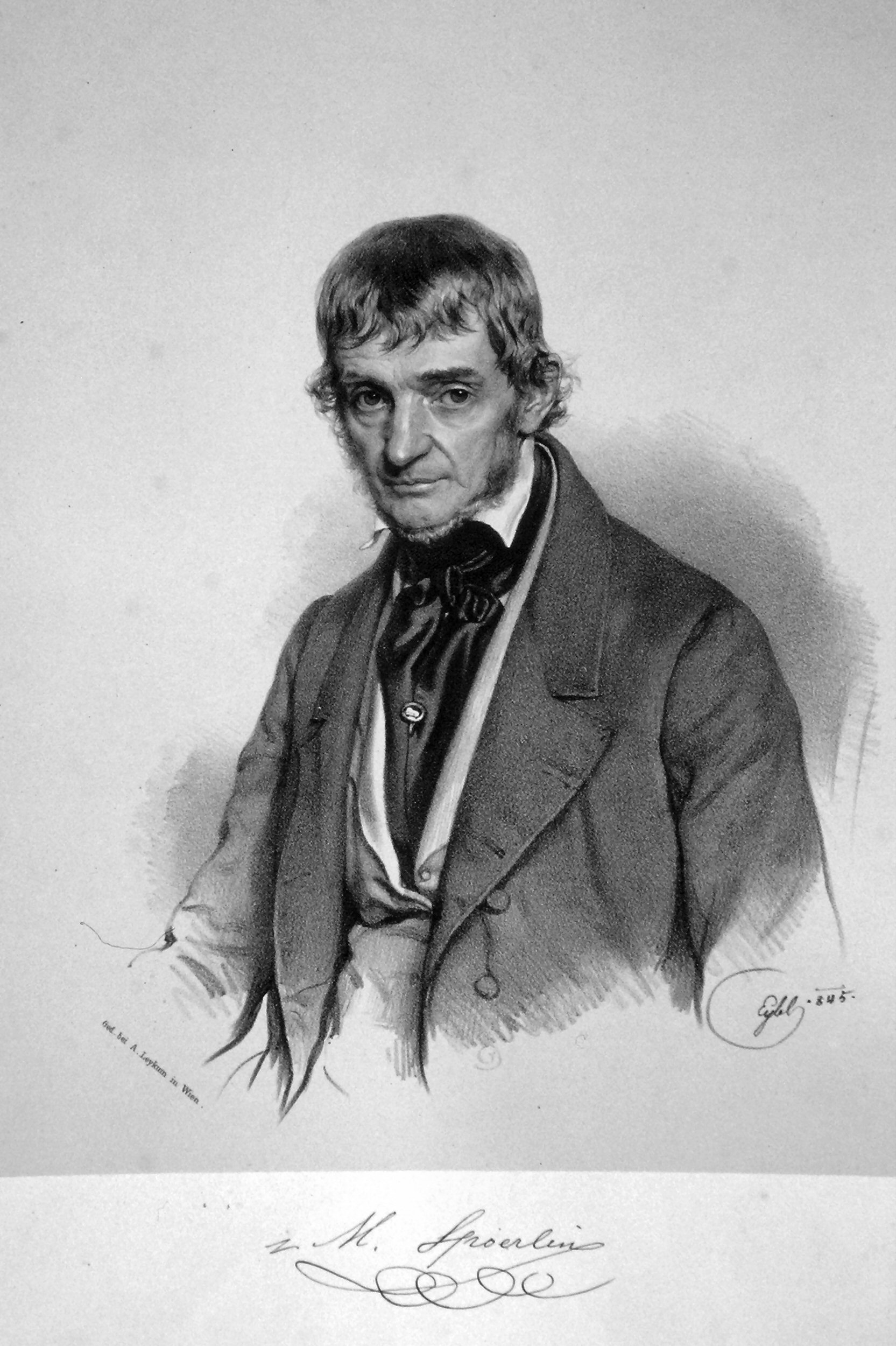 Michael Spoerlin (1784-1857), österreichischer Industrieller, Tapetenfabrikant. Lithographie von Franz Eybl, 1845